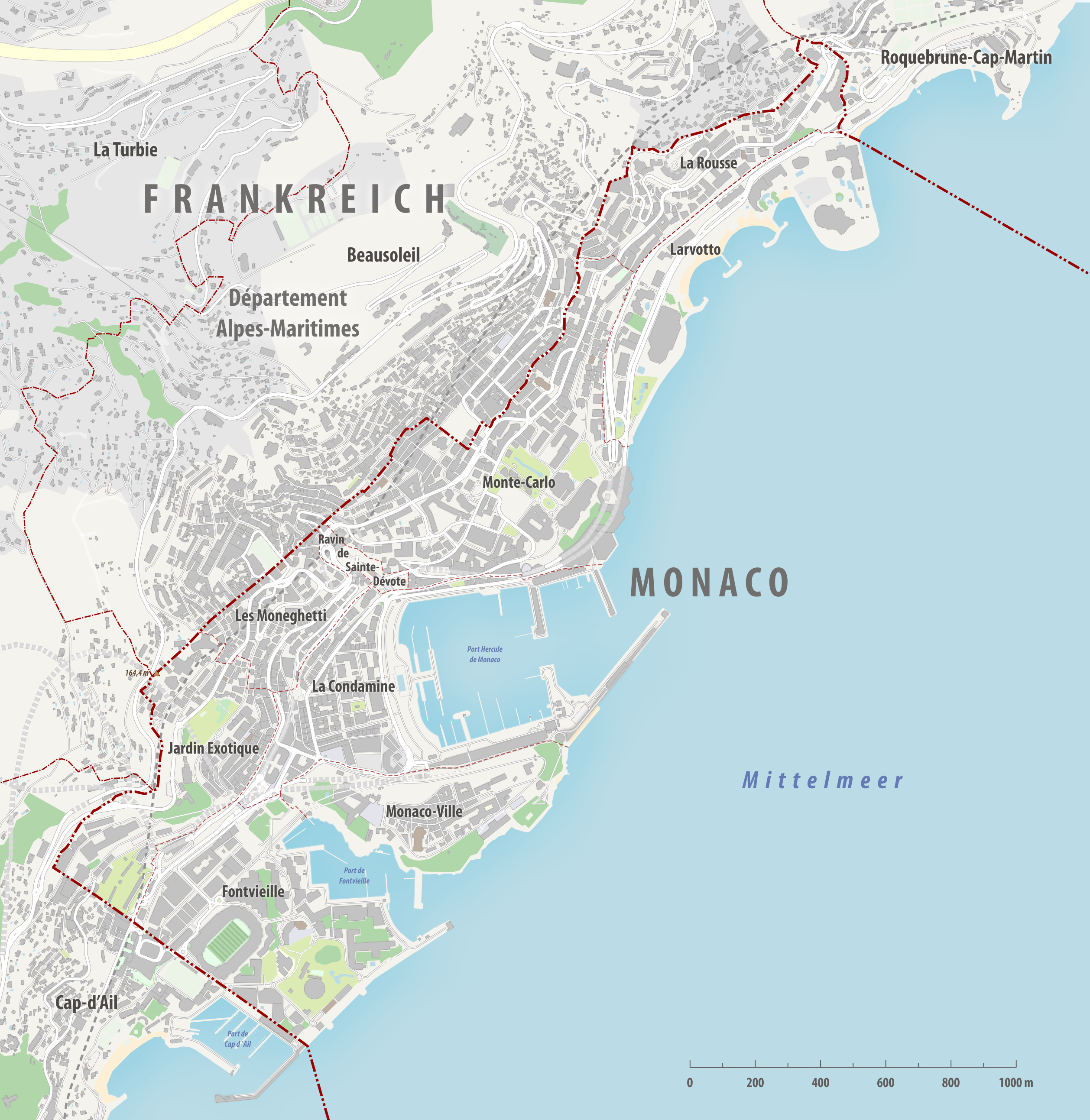 Reliefkarte des Grenzverlaufes zwischen Frankreich und Monaco